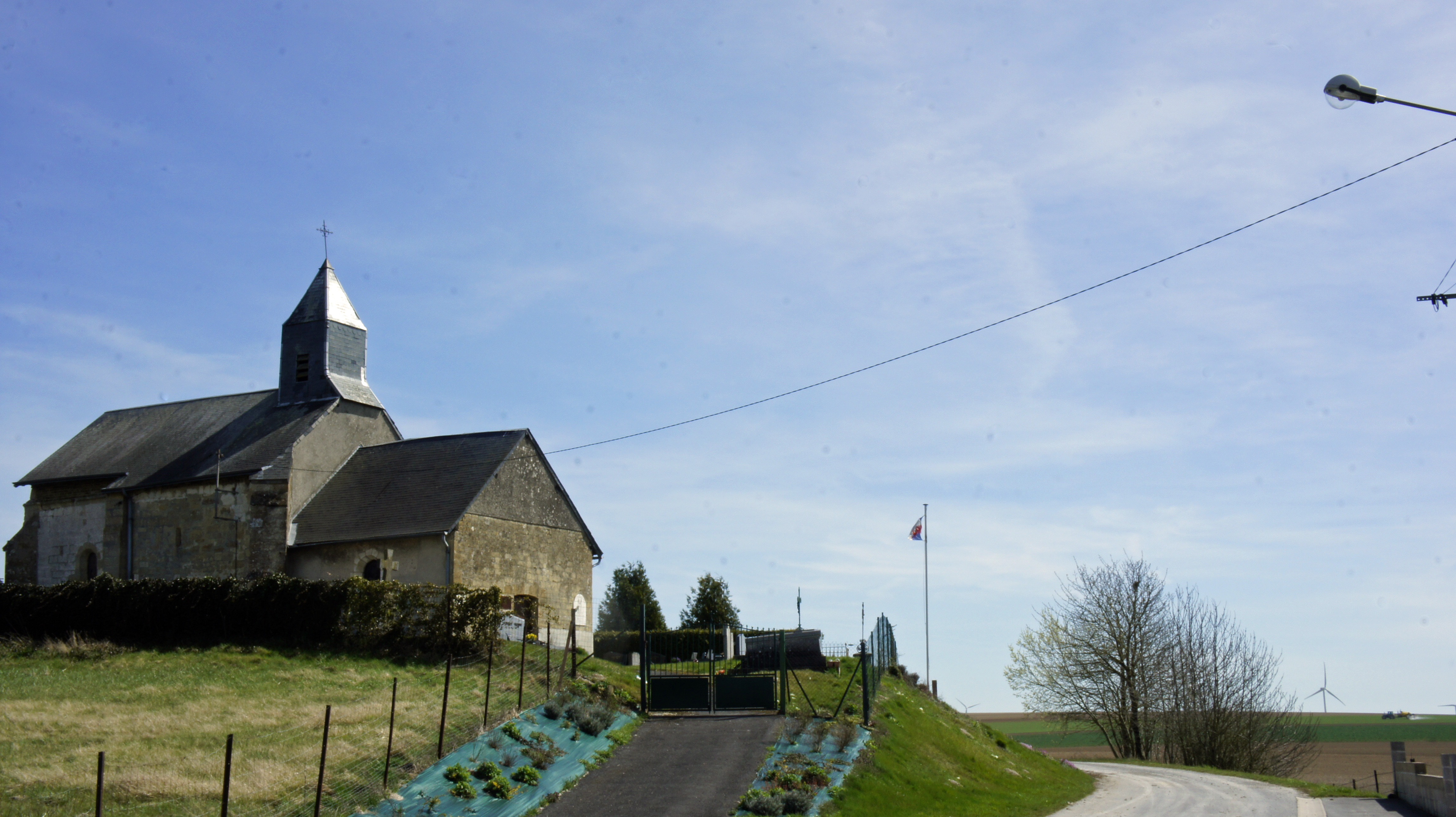 Dricourt,Église éolienne tracteur .